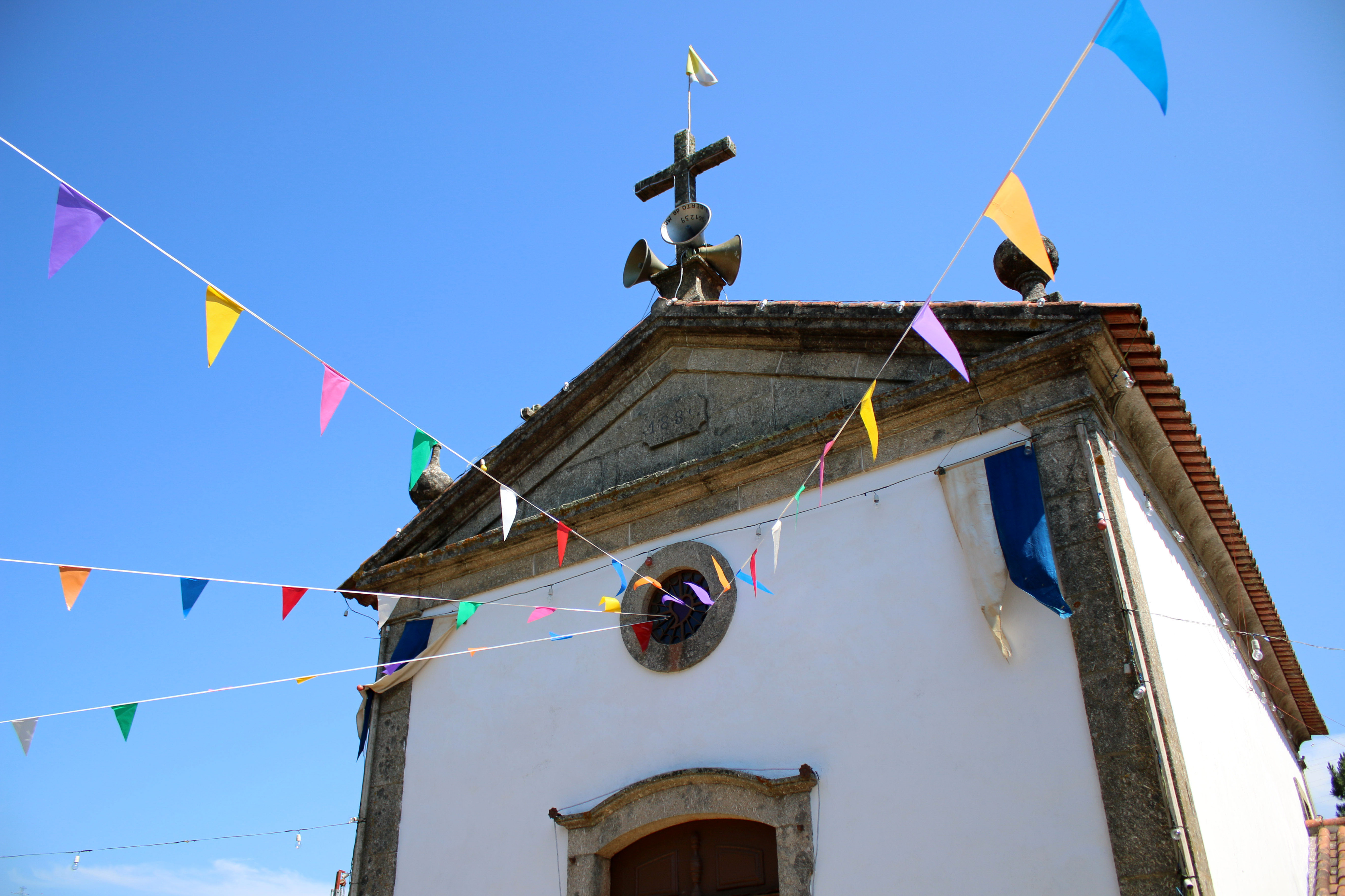 Capela do Santo Padroeiro